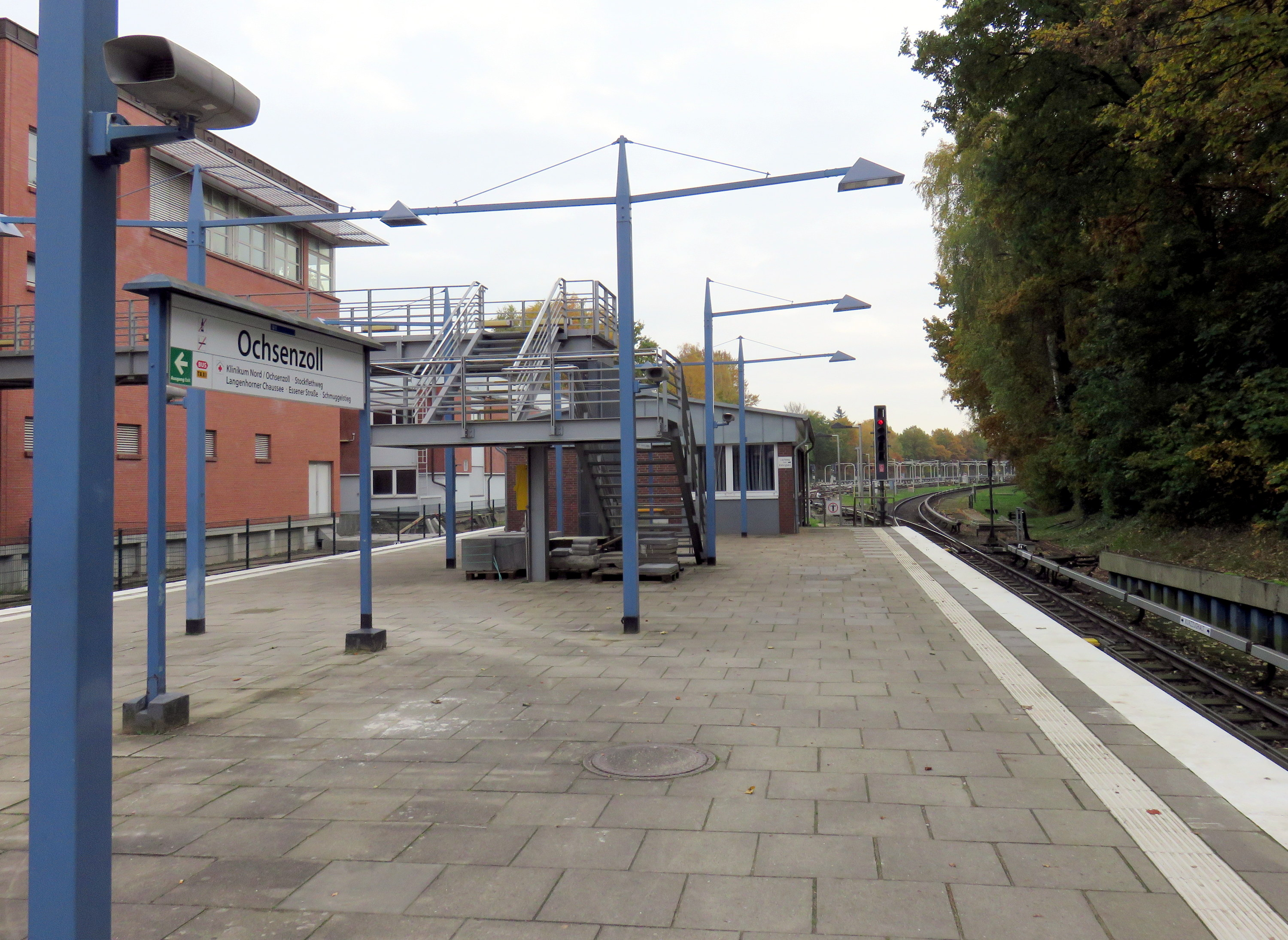 U-Bahnhof Ochsenzoll in Ochsenzoll im Stadtteil Hamburg-Langenhorn. Bahnsteig, Blick stadteinwärts.